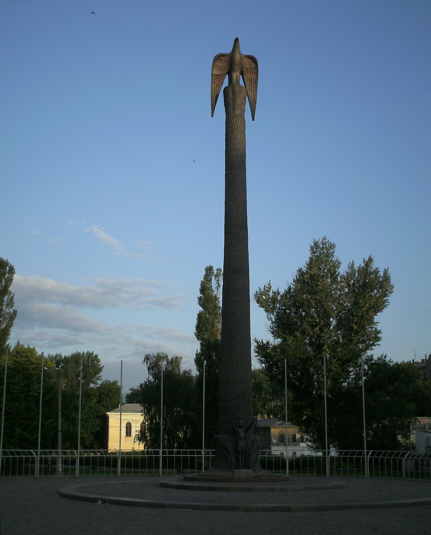 Харьков